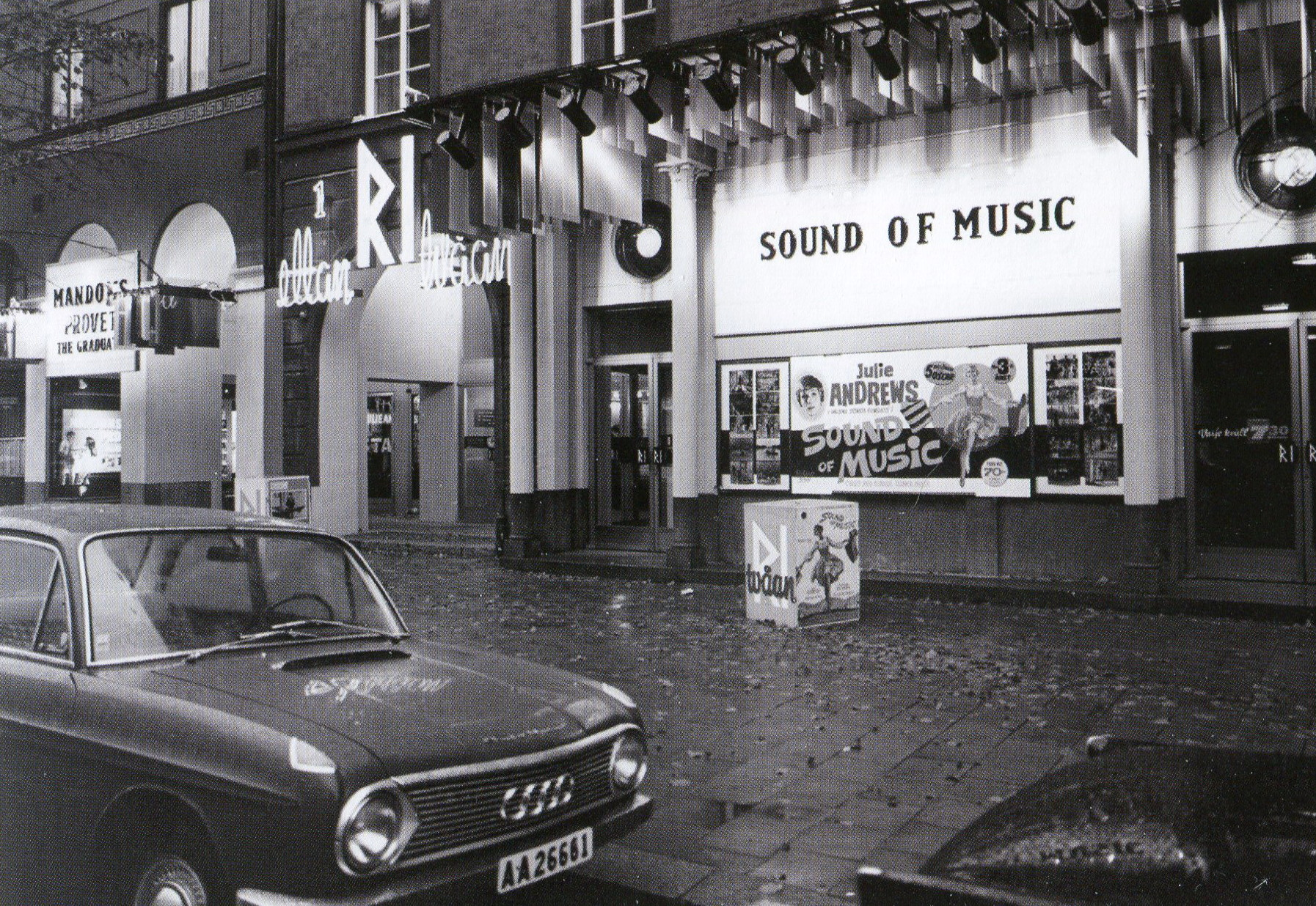 Biograferna RI ettan och RI tvåan, Sankt Eriksgatan